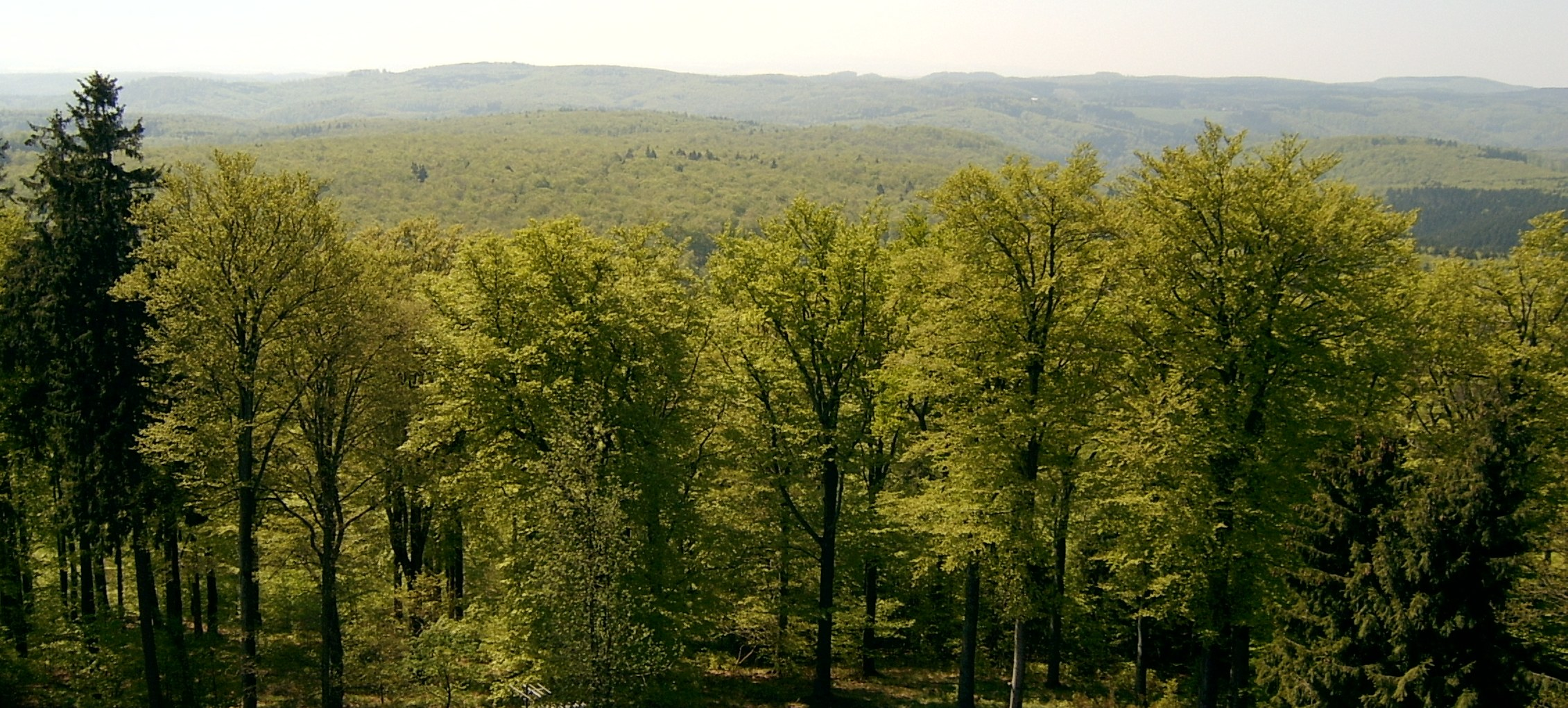 Blick vom Josephskreuz (von einer Zwischenplattform).